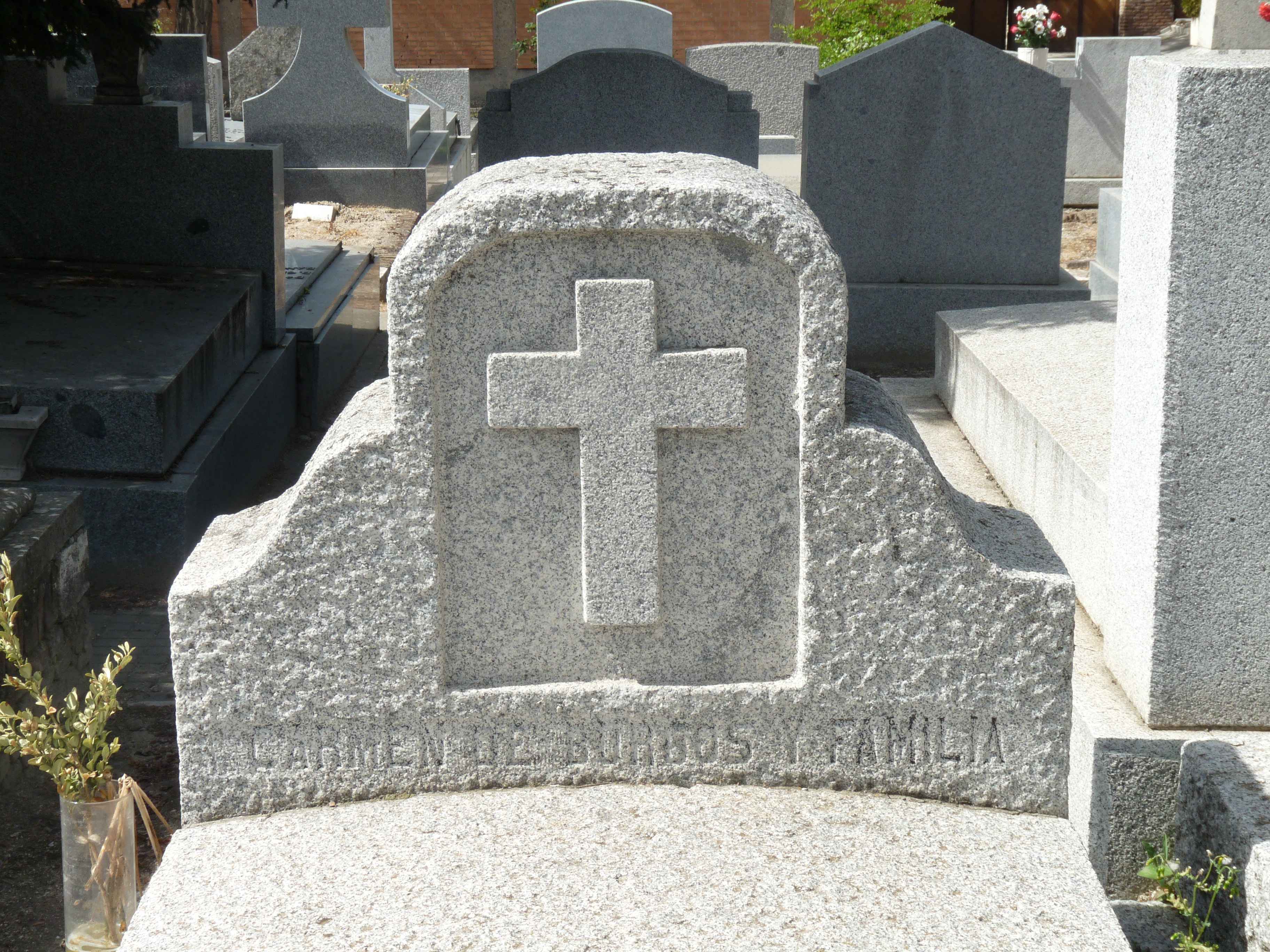 Tumba de Carmen de Burgos y familia en el cementerio civil de Madrid.